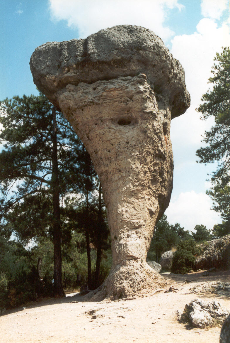 Ejemplo de erosión diferencial en la Ciudad Encantada (Cuenca). Este fenómeno ocasionado por la erosión es típico en la morfología cárstica de las regiones calcáreas. La cobertura caliza superior, más resistente que las margas arcillosas que están por debajo, protege a éstas de las lluvias, aunque el viento y la misma lluvia va desgastando la columna hasta que se desploma dicha cobertura. Autor: Fev. Fecha Agosto 2002.